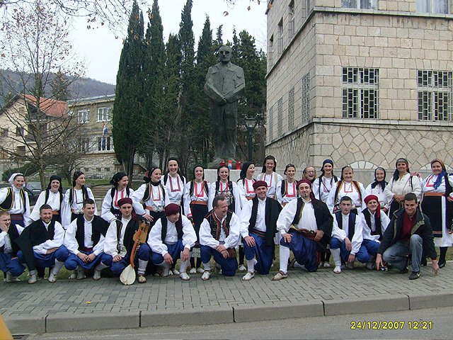 KUD "Brda" u Širokom Brijegu.